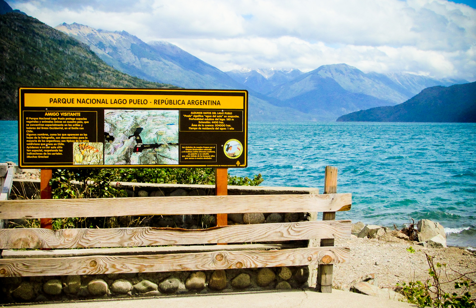 Tomada el día: 16/01/2011